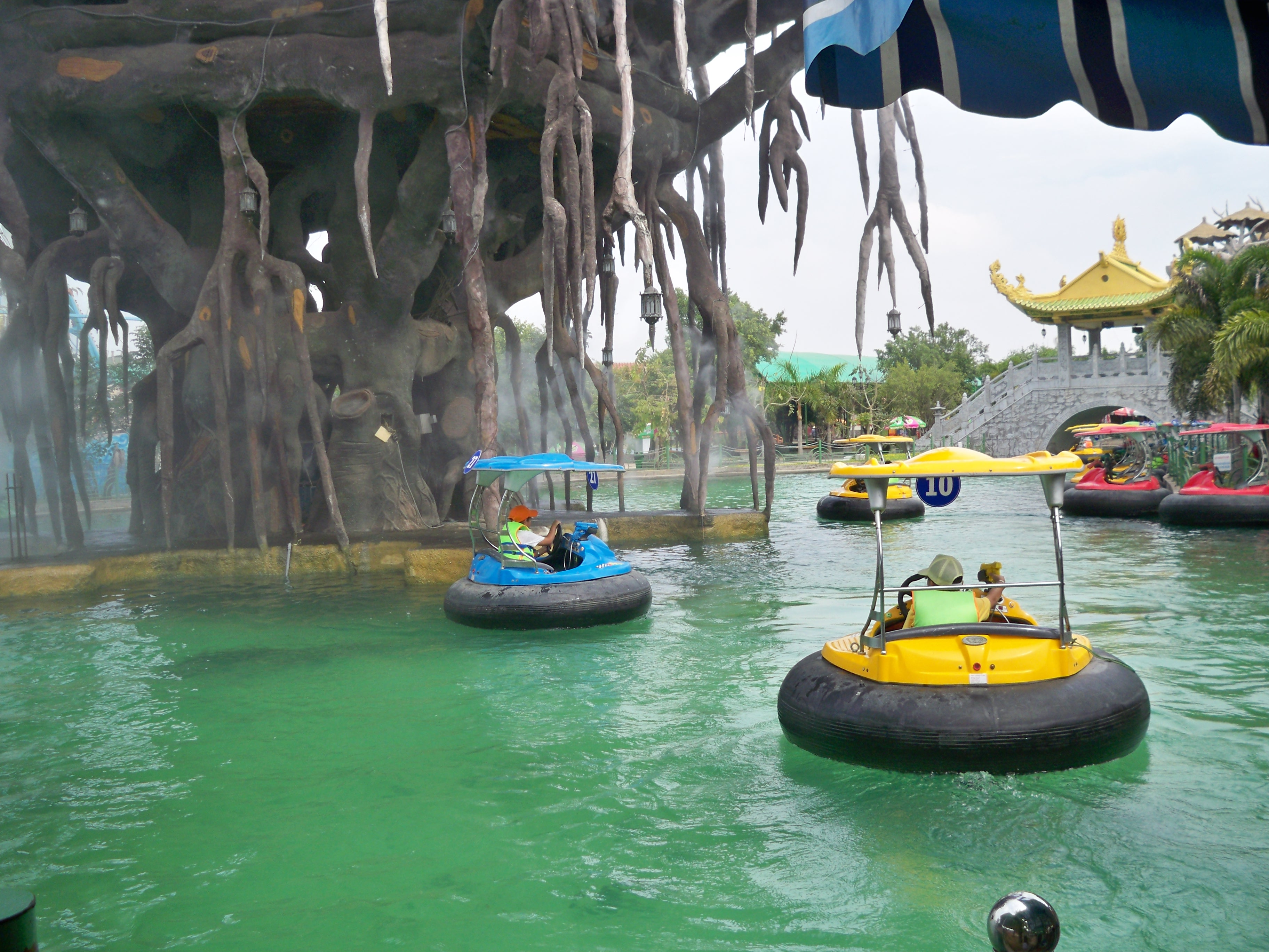 Đại Nam 4